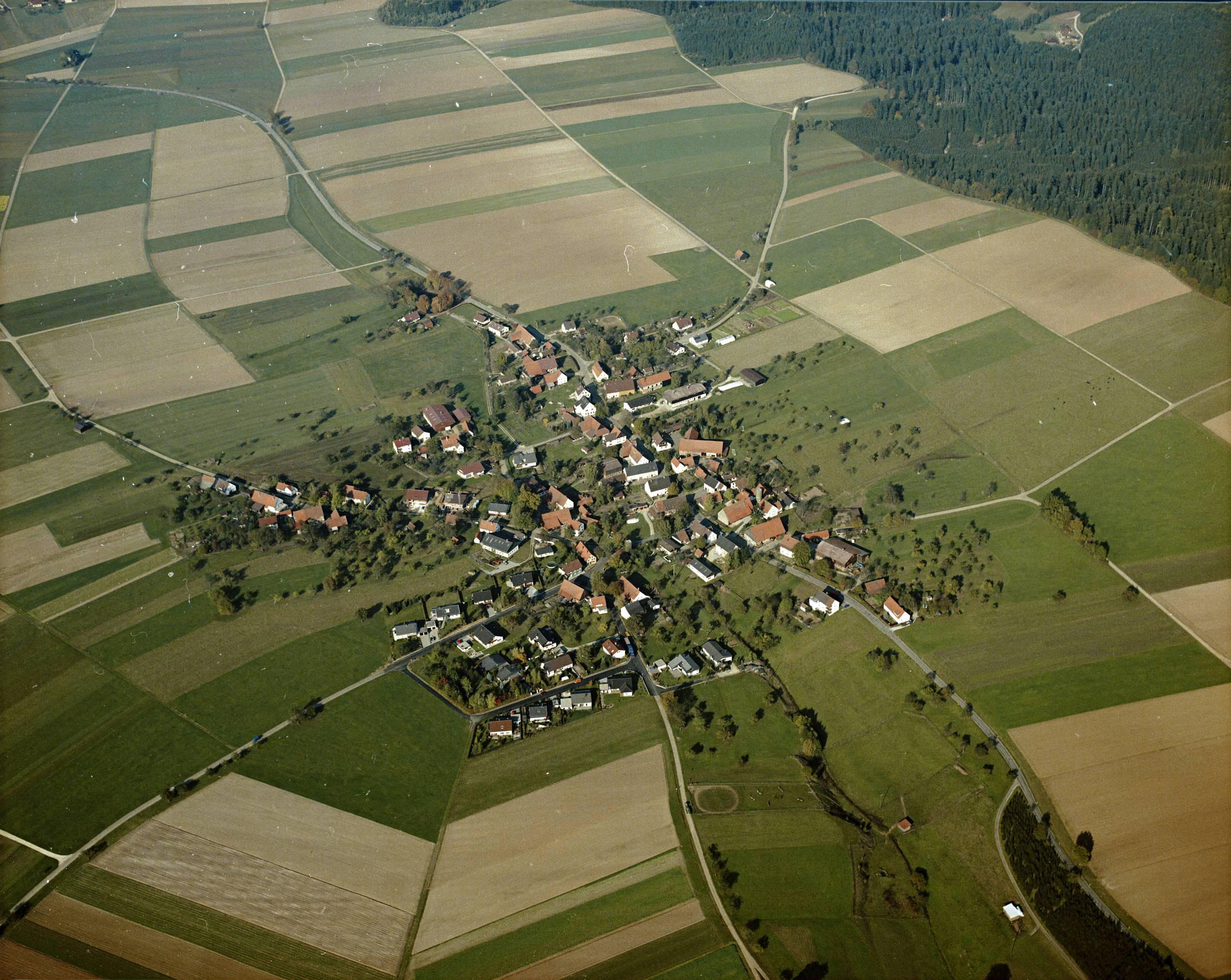 Luftbild von Utzstetten - Staatsarchiv Sigmaringen - Archivalieneinheit N 1/96 T 1 Nr. 590